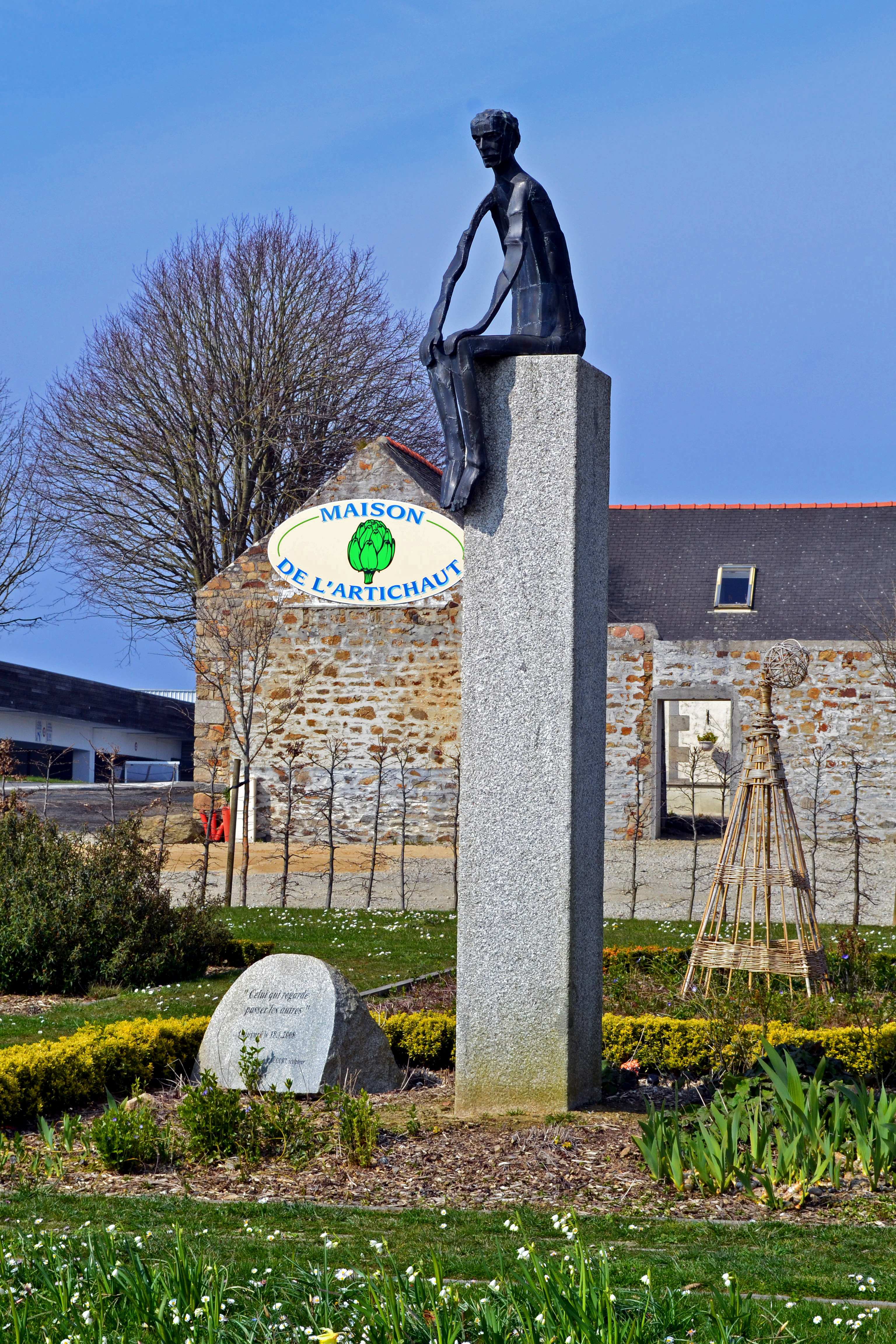 "Celui qui regarde passer les autres", sculpture réalisée par Roger Joncourt en 2008 à Saint-Pol-de-Léon.